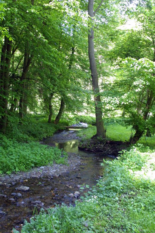 Dolní tok Všehrdského potoka.